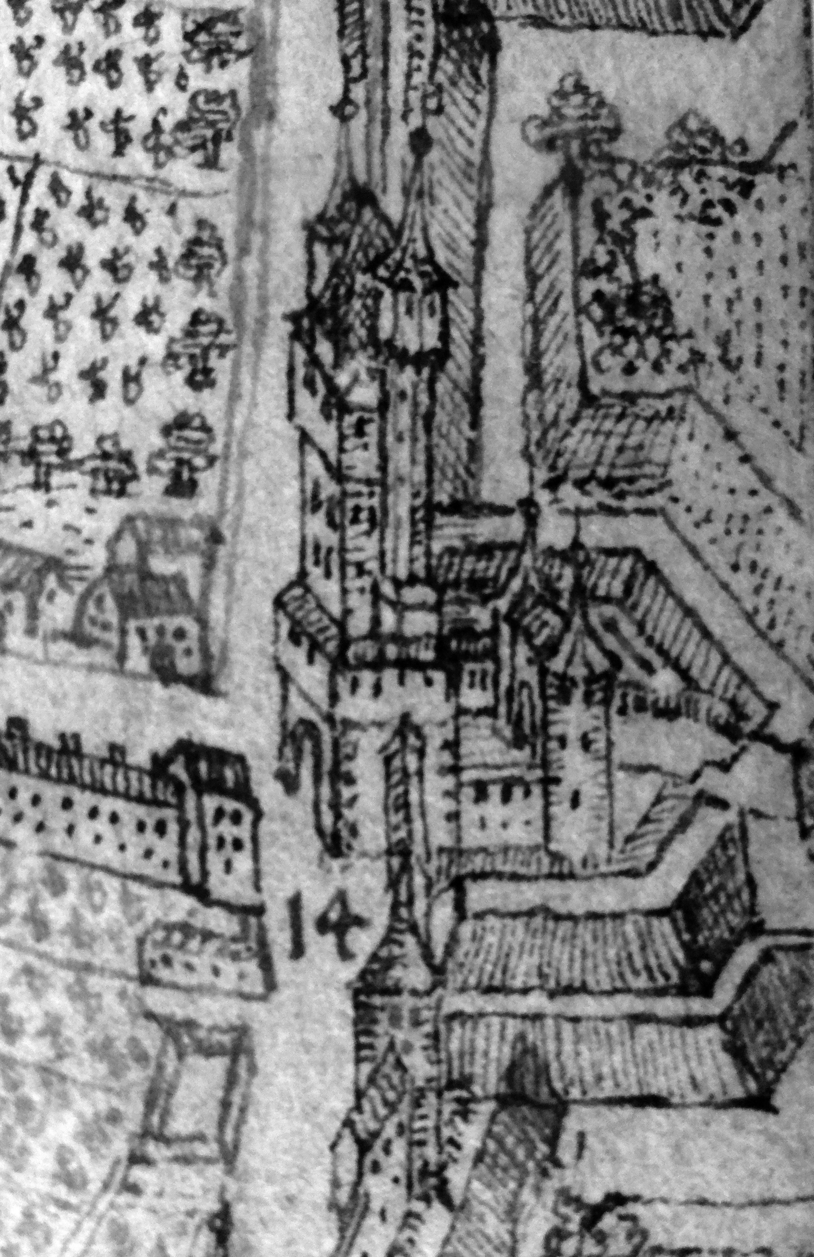 Mainzer Tor, Worms. Detail aus: Peter Hamman: Statt Wormbß wie selbige 1631 vor dem Schwedischen Ruin der Vorstätt [...] verblieben. Stadtarchiv Worms, Abt. 1B, Nr. 48.